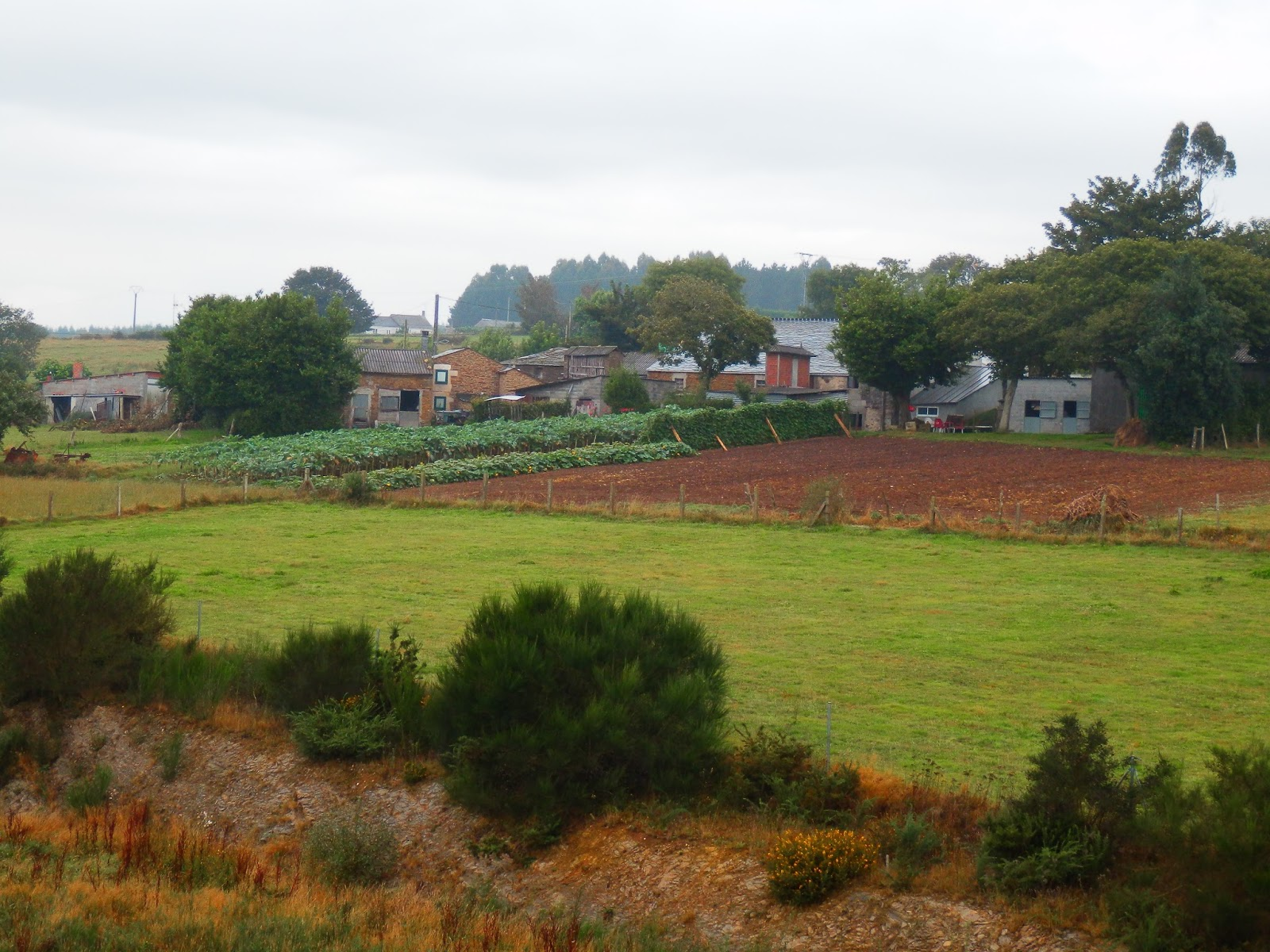 Casas na Xesta, Quende, Abadín, España